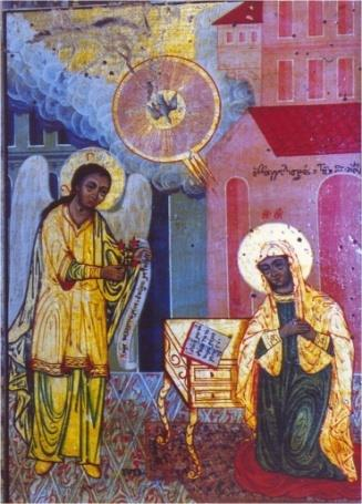 Ανώνυμος, Ευαγγελισμός, 1825, Εκκλησιαστικό Μουσείο Ιεράς Μητρόπολης Θεσσαλονίκης